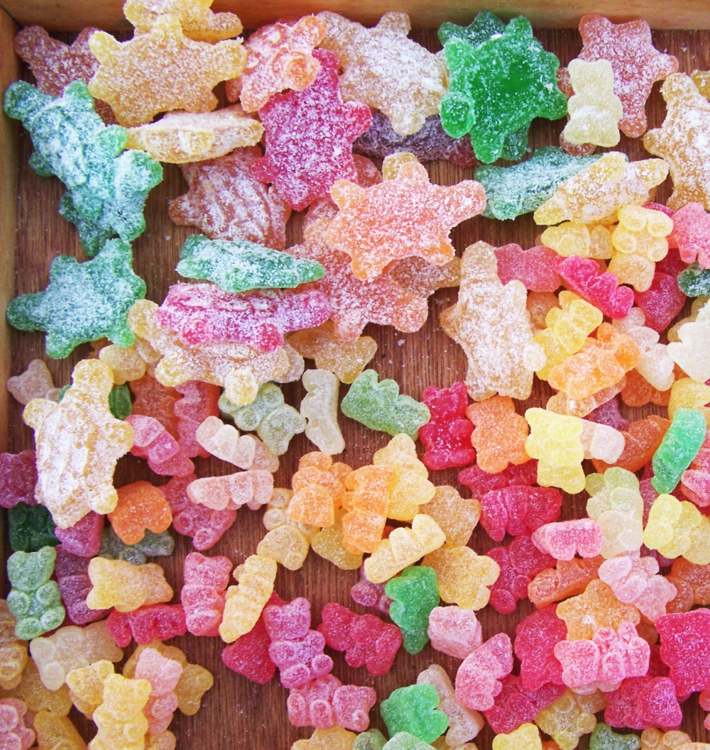 bonbons.jpg